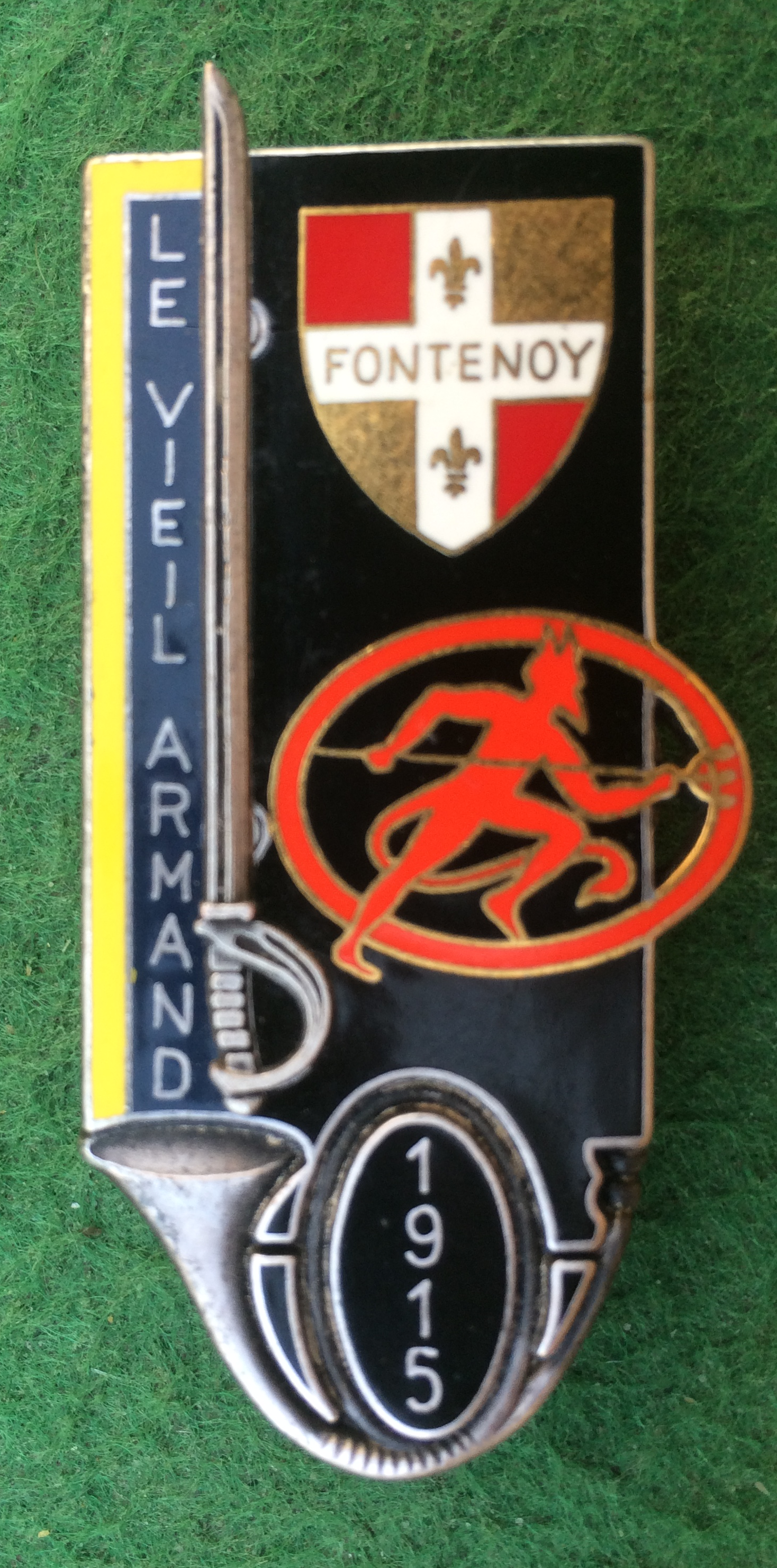 Insigne de la promotion du bataillon EOR de l'ESM Saint-Cyr Coëtquidan «Le Vieil-Armand» (1985). Il célèbre le 70e anniversaire de la bataille du Hartmannswillerkopf ou du Vieil-Armand. Y figure «Fontenoy», un lieu de la bataille ; les insignes des Chasseurs alpins, le clairon avec la date de 1915 (année durant laquelle la bataille se déroule) et «Les diables bleus», dont la couleur est "bleu cerise" (prononcer le rouge est interdit dans leurs traditions). L'épée symbolise l'école d'officier (Fraisse - Paris).